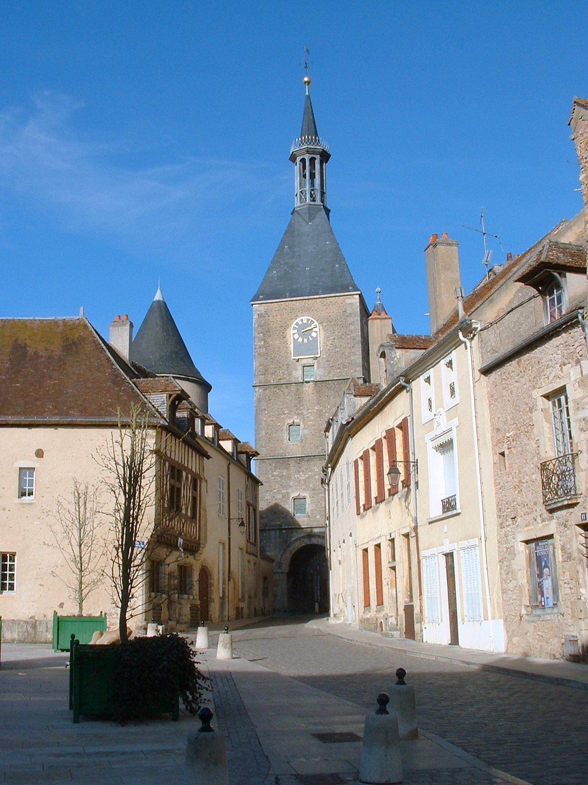 Avallon : la tour de l'horloge